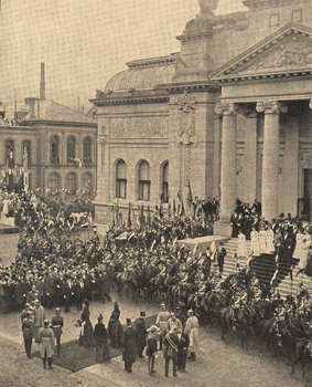 Barmer Ruhmeshalle, Wuppertal; Heute "Haus der Jugend"; Einweihung